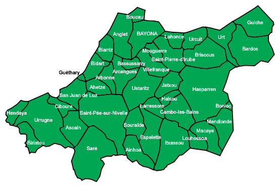 Comunas de Labort